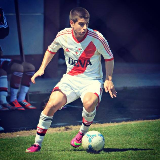 Club Atlético River Plate